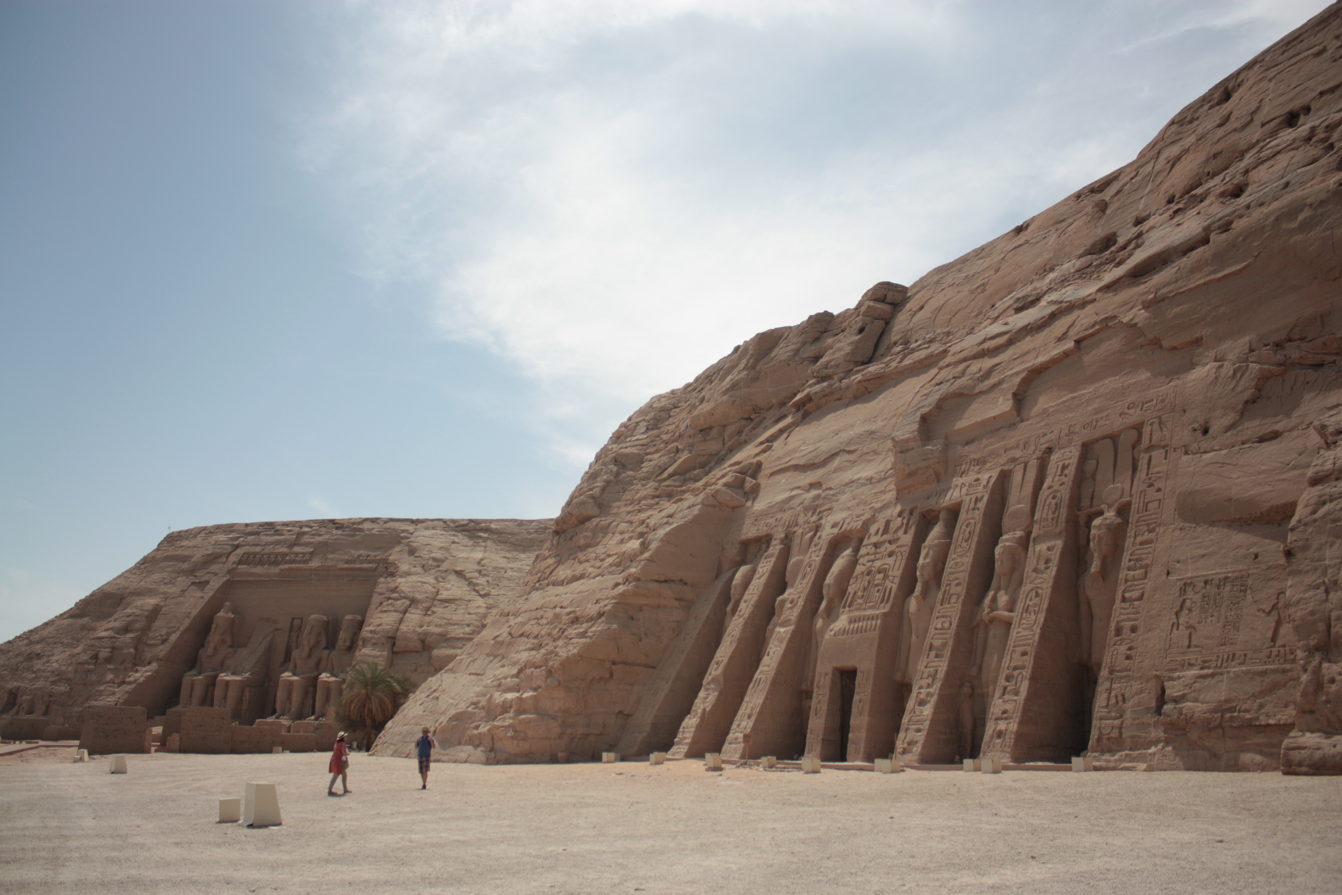 معبدا ابو سمبل